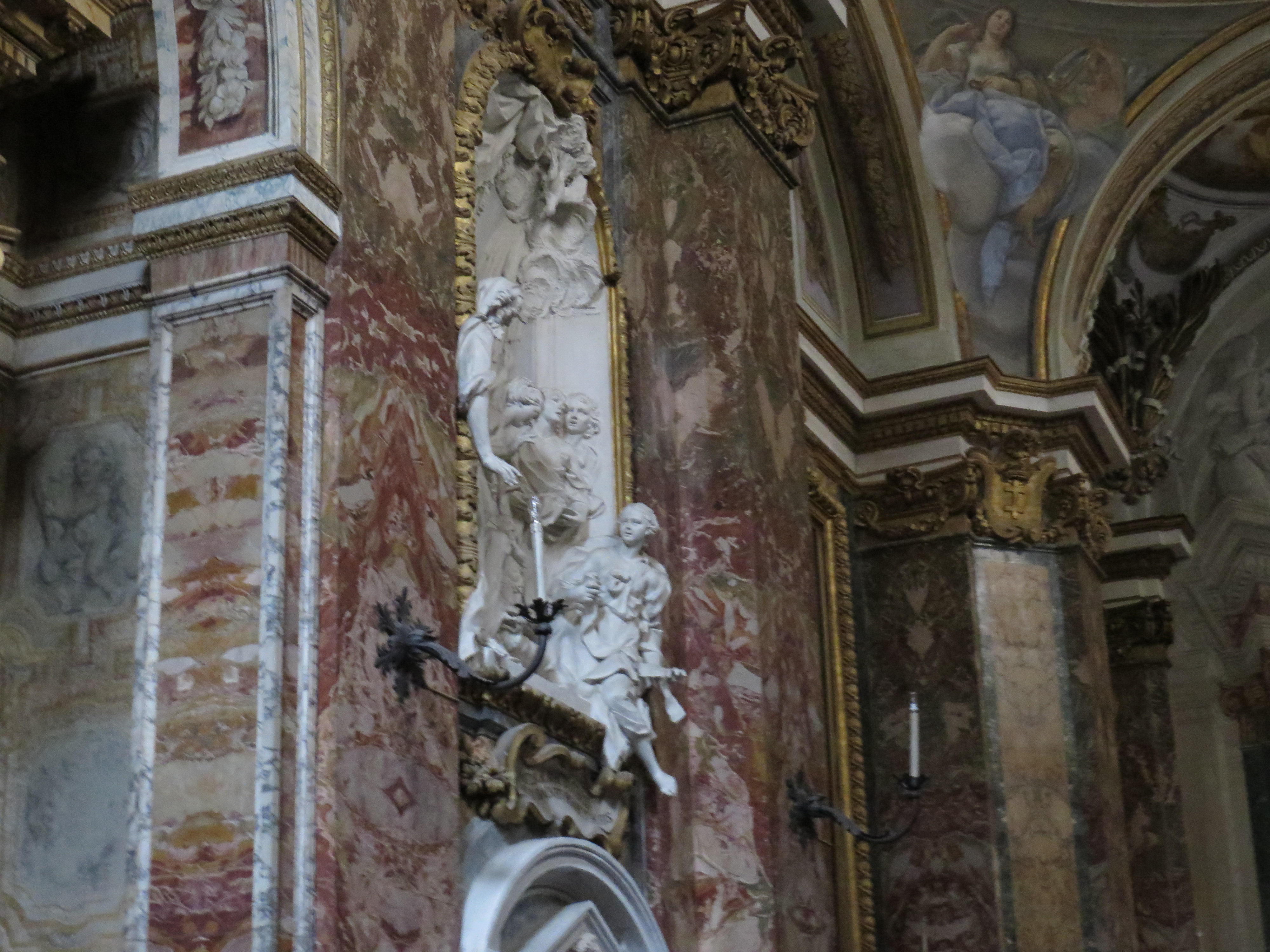 No muy conocida, frente a Sta. Maria dell'Anima